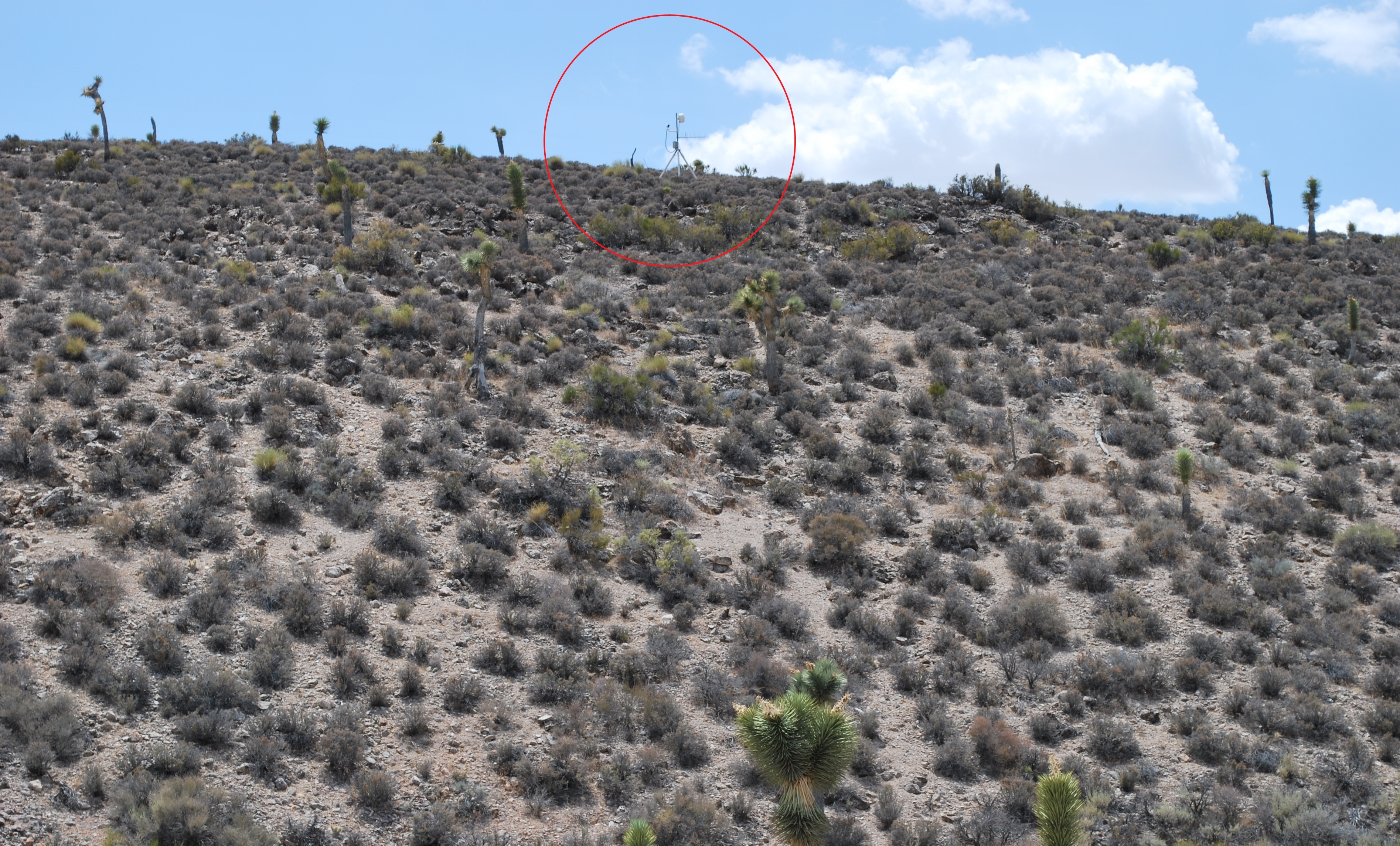 Ueberwachungskamera_an_der_Groom_Lake_Road